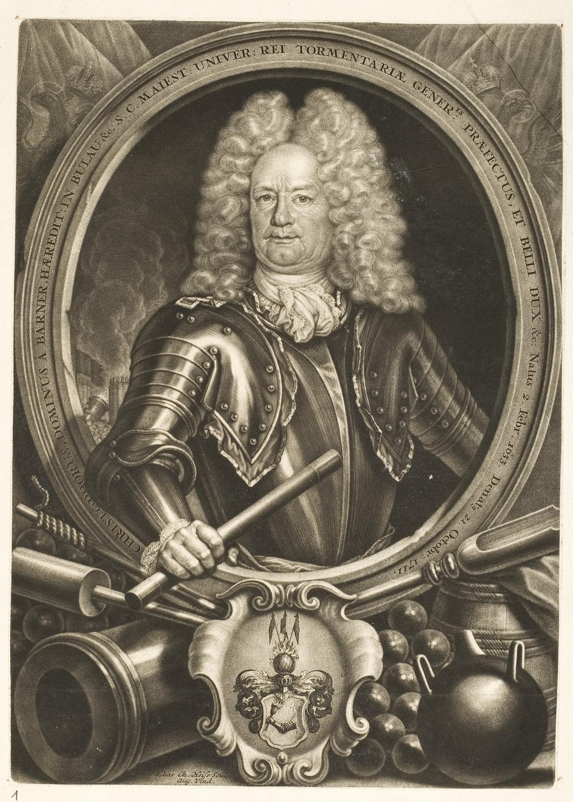 Grafik aus dem Klebeband Nr. 1 der Fürstlich Waldeckschen Hofbibliothek Arolsen Motiv: Christoph von Barner, kaiserlicher General-Feldzeugmeister und oberster Kommandeur der kaiserlichen Artillerie